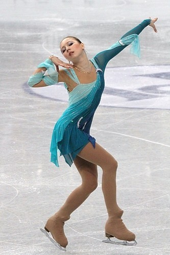 Полина Шелепень (Россия) на чемпионате мира по фигурному катанию 2012